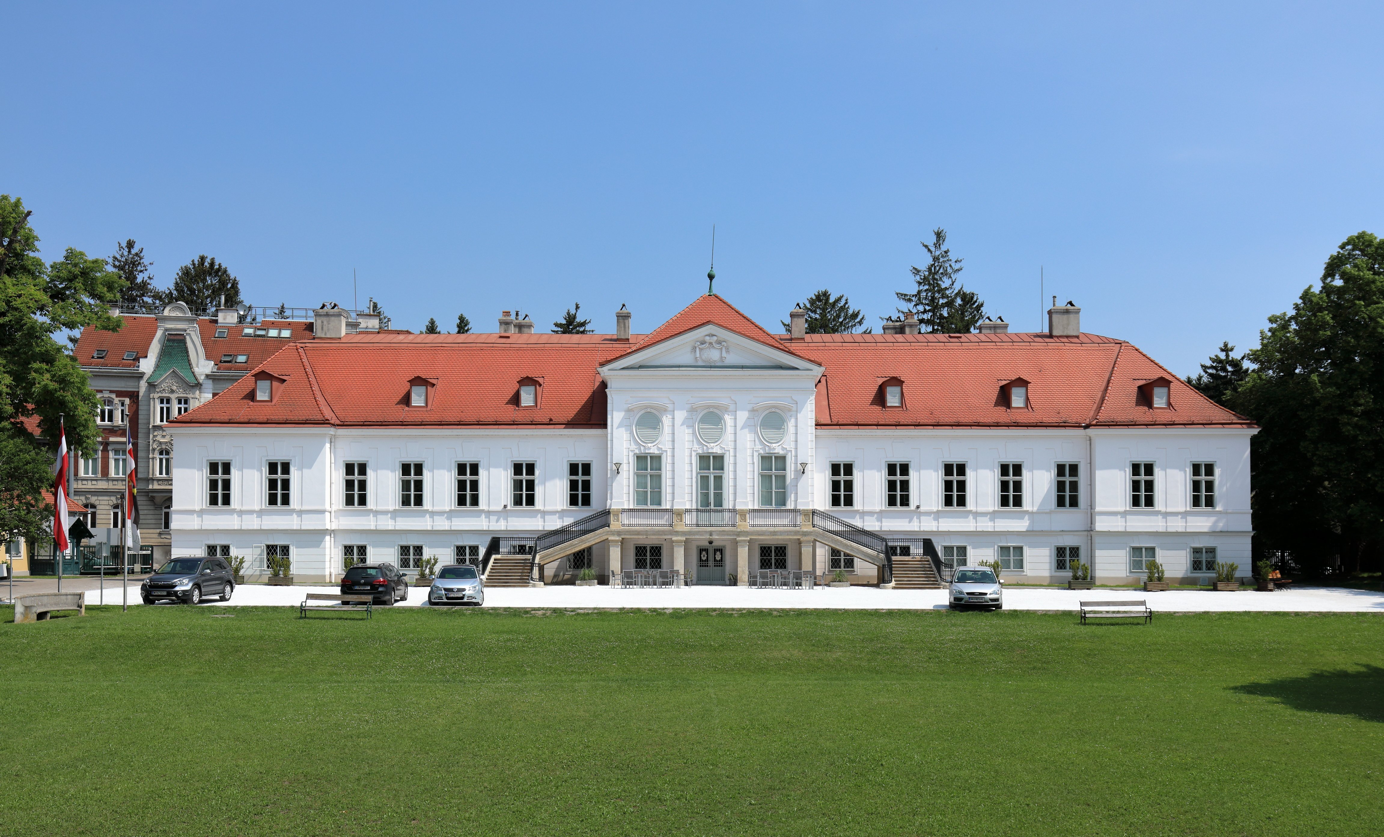 Gartenseitige Ansicht des Miller-Aichholz-Schlössl (Seminarhaus des „Europahauses Wien“) in Hütteldorf, ein Bezirksteil des 14. Wiener Gemeindebezirks Penzing.Im 2. Viertel des 18. Jahrhunderts nach Plänen von Johann Bernhard Fischer von Erlach als Jagdschloss errichtet. Im Jahre 1894 kaufte Dr. Heinrich Miller zu Aichholz die Schlossanlage und verkaufte sie 1938 an den deutschen Staat. Nach dem Krieg ging das Schloss in das Eigentum der Republik Österreich über und wurde der Österreichischen Jungarbeiterbewegung zur Verfügung gestellt, die es gemeinsam mit dem im Park errichteten Neugebäuden als „Europahaus“ betreibt und hier Tagungen, Seminare und kulturelle Veranstaltungen abhält.